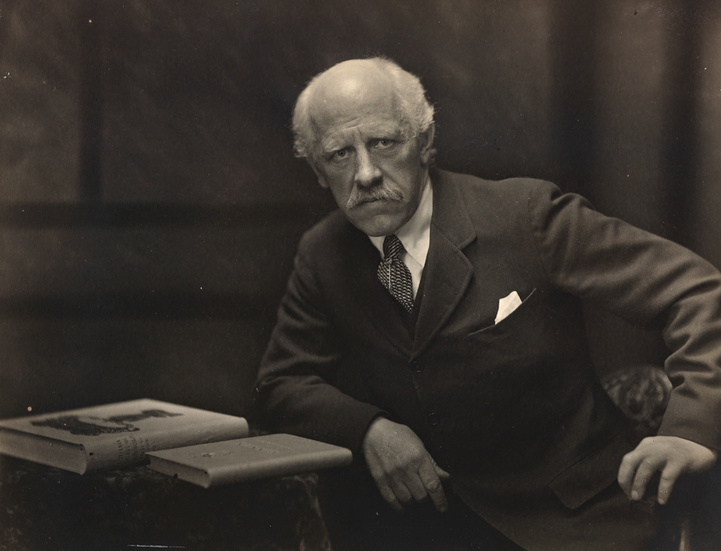 Tittel / Title: Portrett av Fridtjof Nansen Motiv / Motif: Fridtjof Nansen som fredsprisvinner. Han fikk prisen for humanitært hjelpearbeid med krigsfanger, flyktninger og sultende i Russland. Dato / Date: 1922 Fotograf / Photographer: Anders Beer Wilse (1865-1949) Sted / Place: Oslo Eier / Owner Institution: Nasjonalbiblioteket / National Library of Norway Lenke / Link: Bildesignatur / Image Number: no-nb_bldsa_q01a009